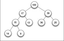 Max heap polovicni velikost